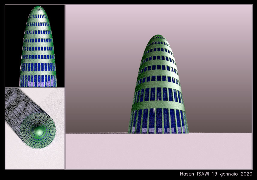 القوس السلسلي هو محل هندسي للنقاط التي كل منها تحمل نفس الوزن من مجموع الوزن الكلي للقوس، ولهذا يُستخدم في إنشاء الهياكل المعمارية. وتتميز الهياكل التي تُصنع بشكل سلسلي بانها تخضع فقط لقوة الشد ، كما يحدث في الحبال التي تدعم الجسور المعلقه. أو من قوة الضغط عندما تكون معكوسة، كما في هياكل القباب رابط مقرر الهندسة الوصفية